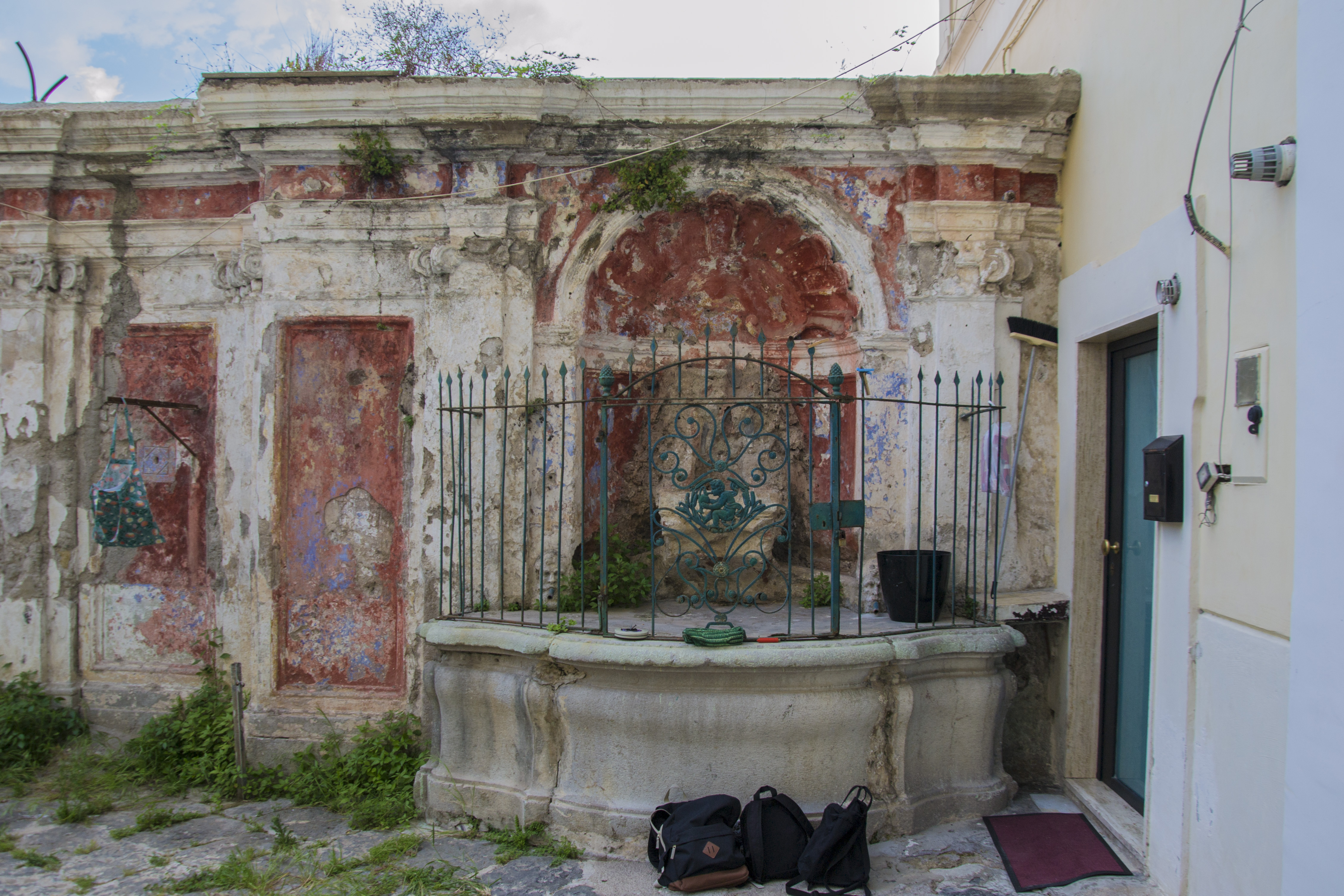 Dettaglio degli interni di palazzo Copeta